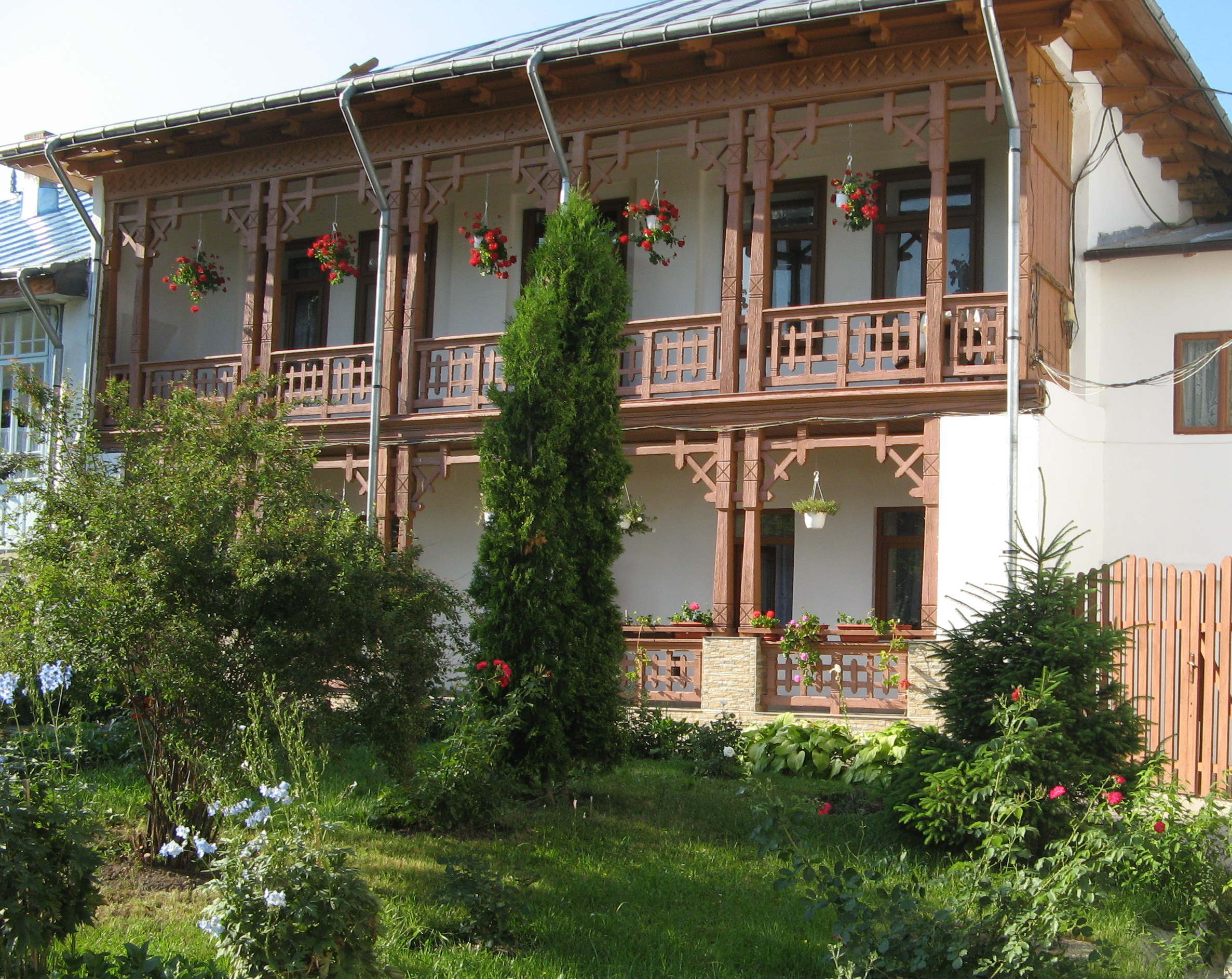 Case monahale 05